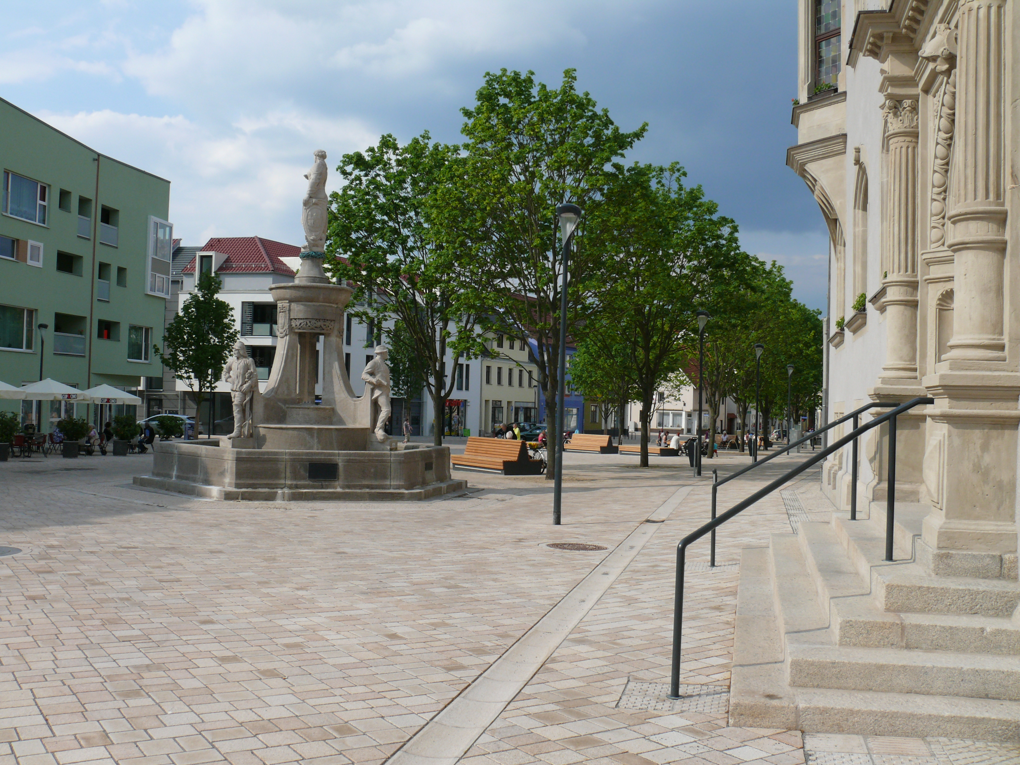 Markt Schönebeck (Elbe) Shared Space